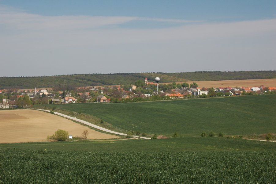 Unín